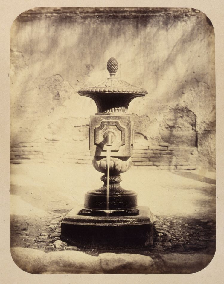 Fuente en la calle de la Madera. Obra en 1864 del fotógrafo toledano Alfonso Begué, muerto el 31 de octubre de 1865. Cartulina sepia. Albúmina. 43 x 32 cm. Fotografía contenida en un álbum procedente del Archivo de Villa y trasladado al Museo de Historia en 1983.